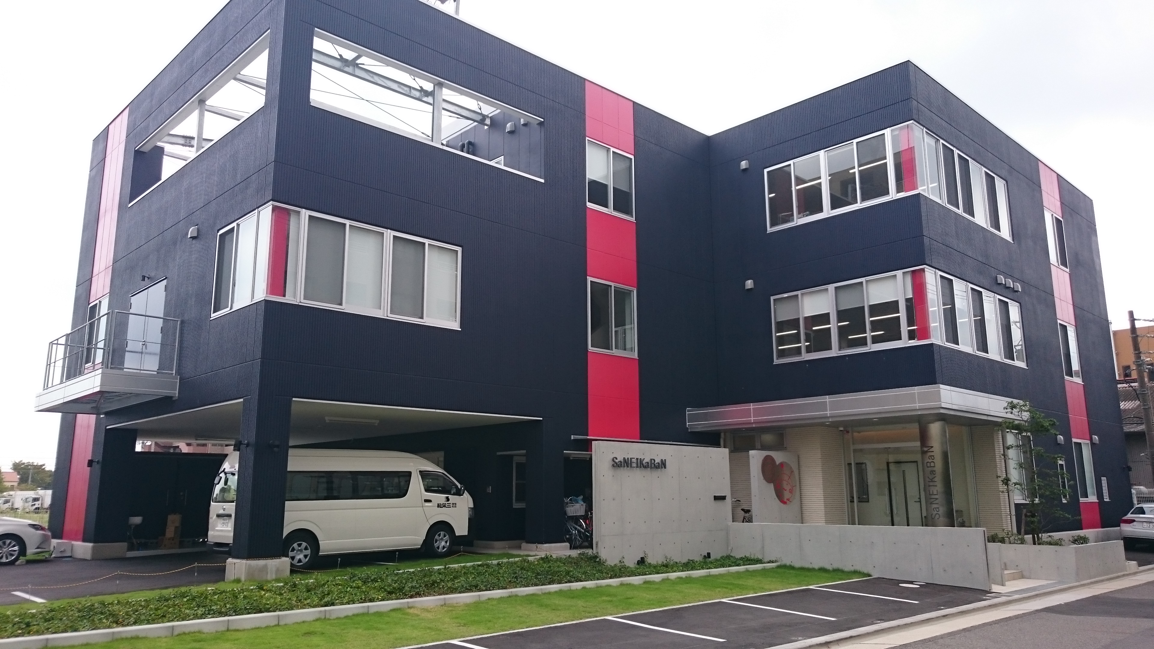 有限会社三栄鞄社屋（愛知県名古屋市守山区瀬古1-810番地）